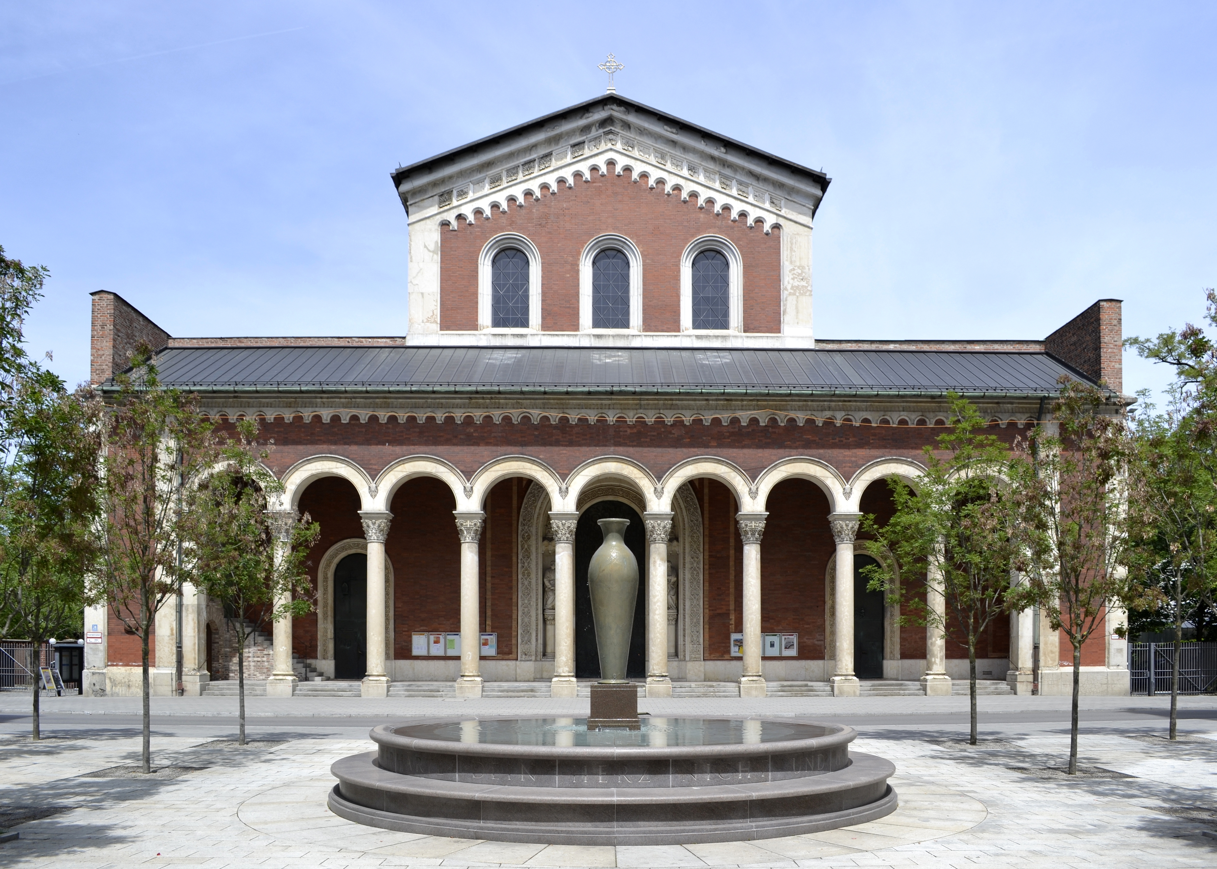 Die Basilika St. Bonifaz in München. Erbaut von 1835 bis 1850 im Auftrag von König Ludwigs I. von Georg Friedrich Ziebland.